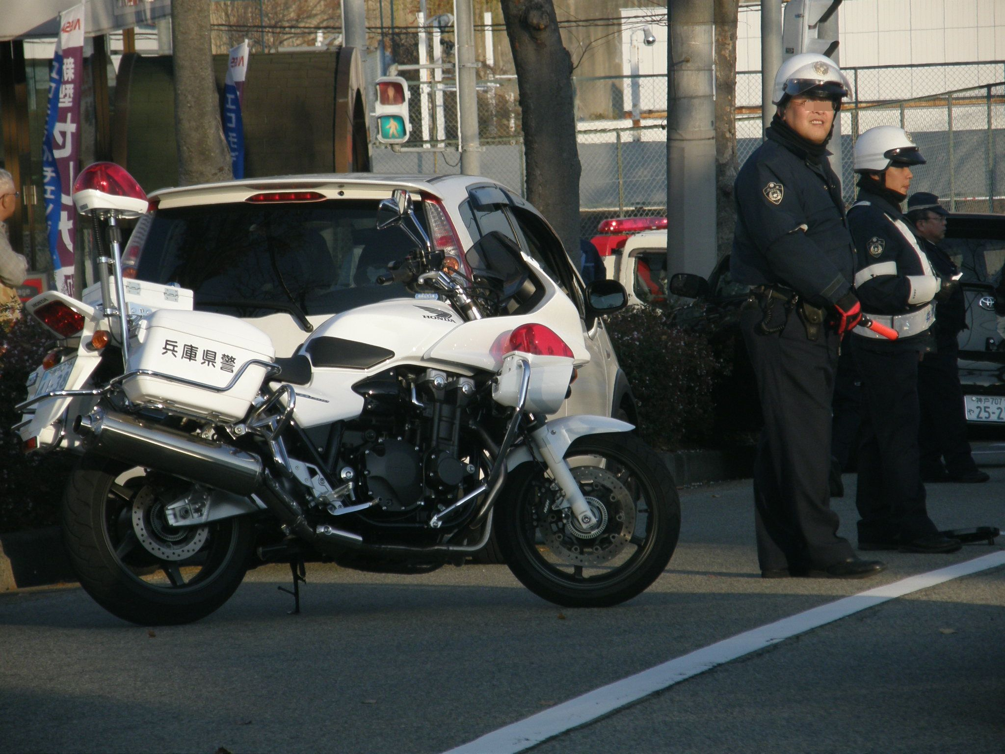 兵庫県警警察官-白バイ 交通事故現場検証